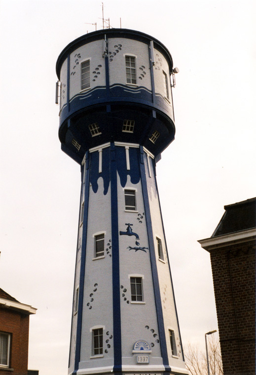 Water tower in Landen (Belgium)